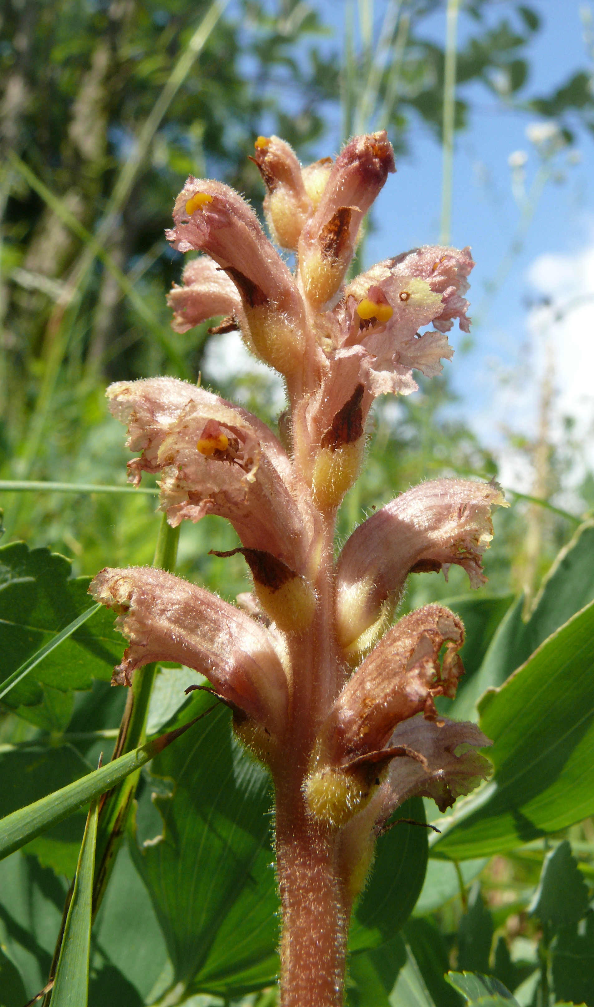 Orobanche alsatica, Tauberland, Deutschland